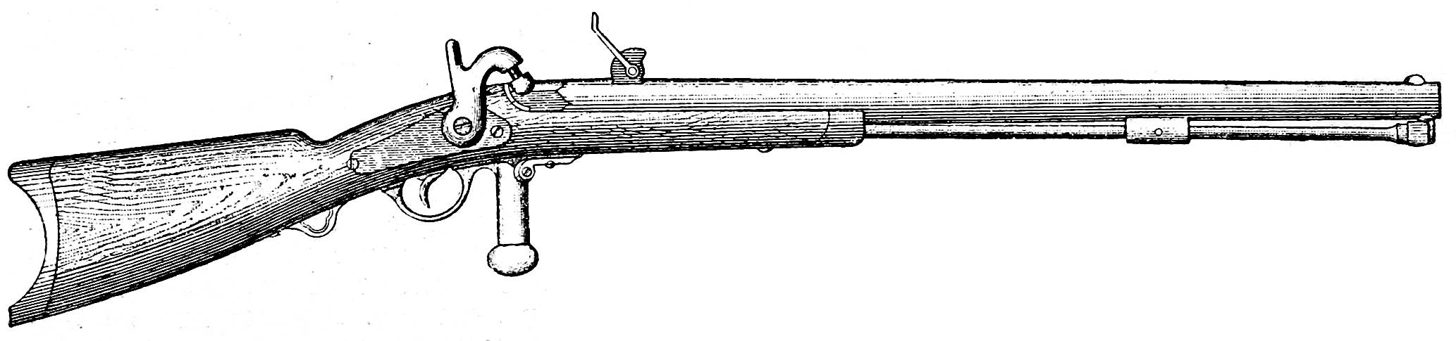 Фиг. 3. Крепостной стержневой штуцер образца 1831 года (рисунок из книги В. Г. Фёдорова: «Атл. черт. к вооруж. разных армий за XIX столетие», №№ 40—43, ф. 42). Эта картинка была также использована для иллюстрирования статьи «Крепостное ружье» опубликованной в четырнадцатом томе «Военной энциклопедии», который был издан книгоиздательским товариществом И. Д. Сытина в 1914 году в столице Российской империи городе Санкт-Петербурге. Более подробное описание к этому рисунку можно прочесть в указанной выше статье на сайте Русской Викитеки.